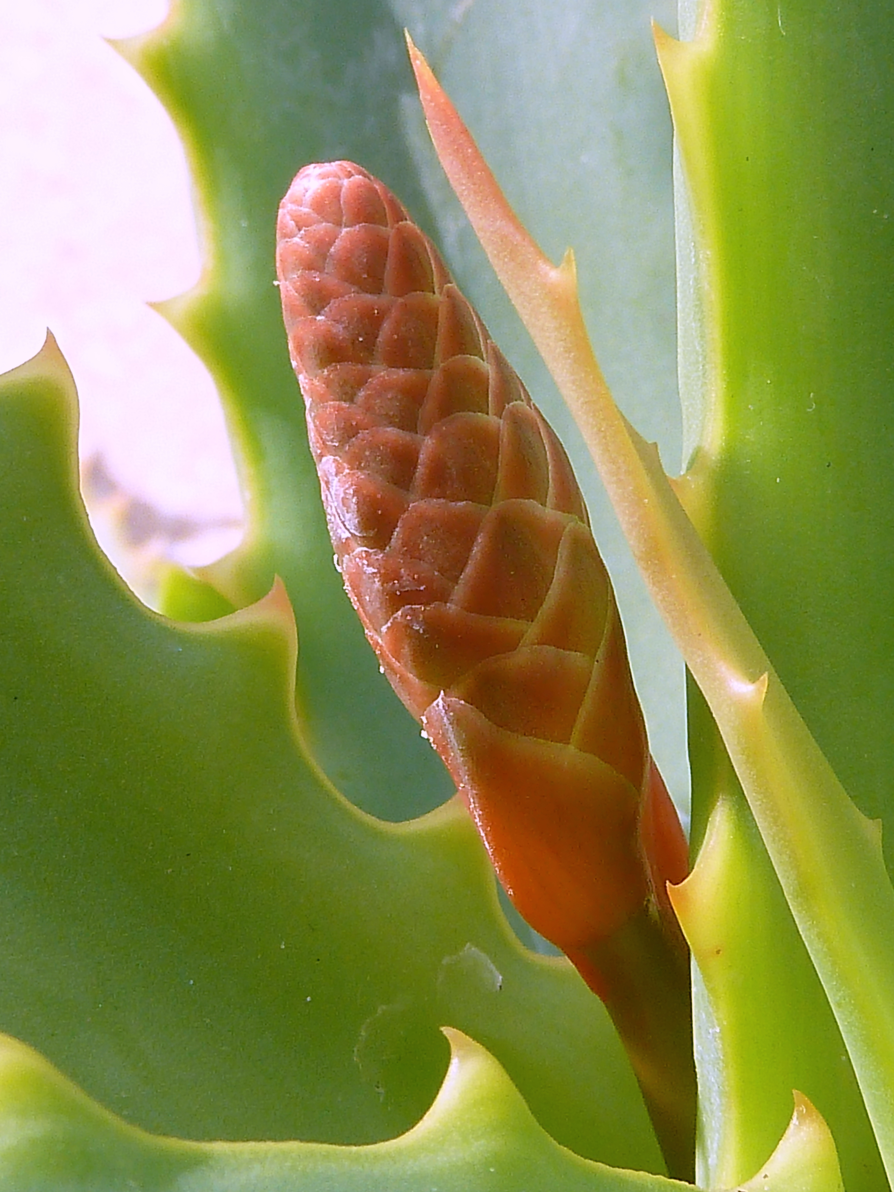 Aloe ex gr. arborescens : Escape floral joven - Águilas (Murcia, España)